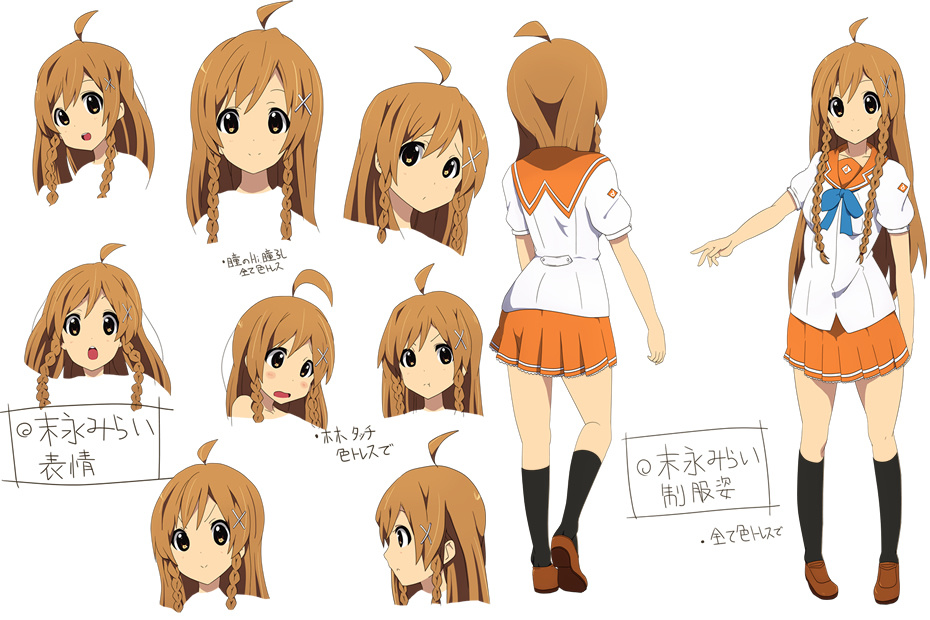 以《K-ON！輕音部》動畫版角色風格畫的夏季學生服末永未來。